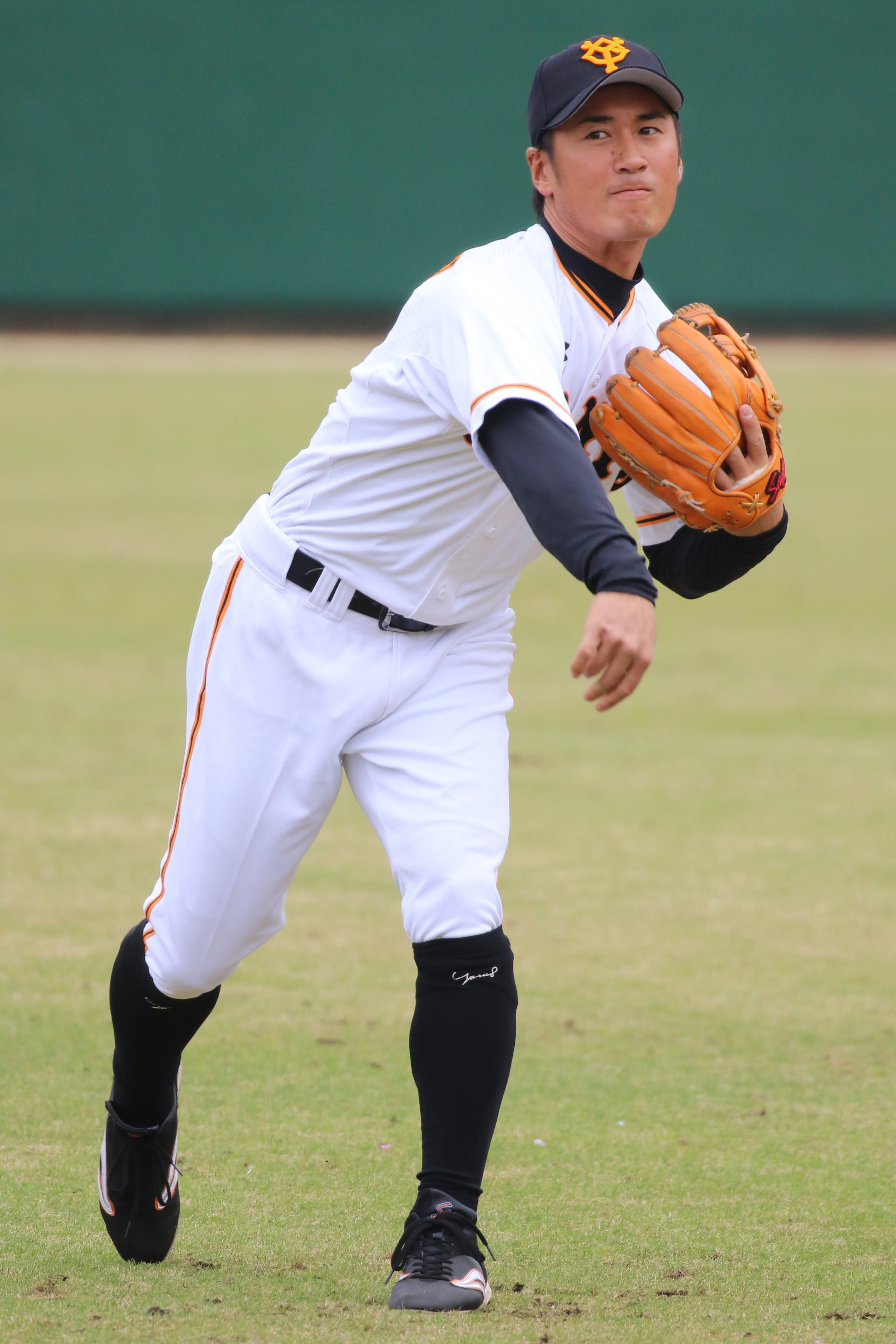 ジャイアンツ片岡選手